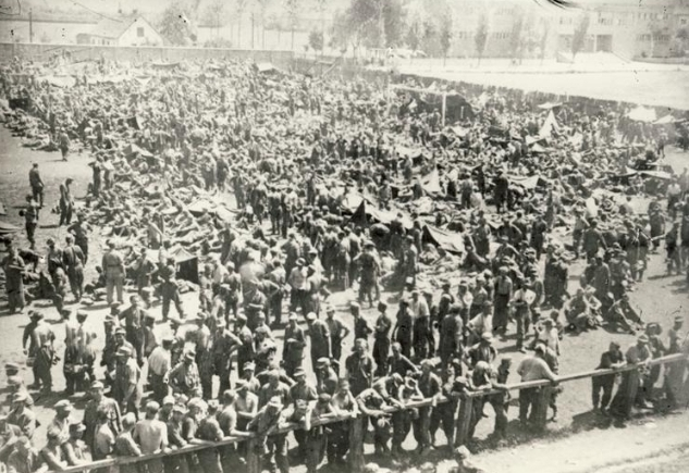 Ujeti Nemci v Celju.